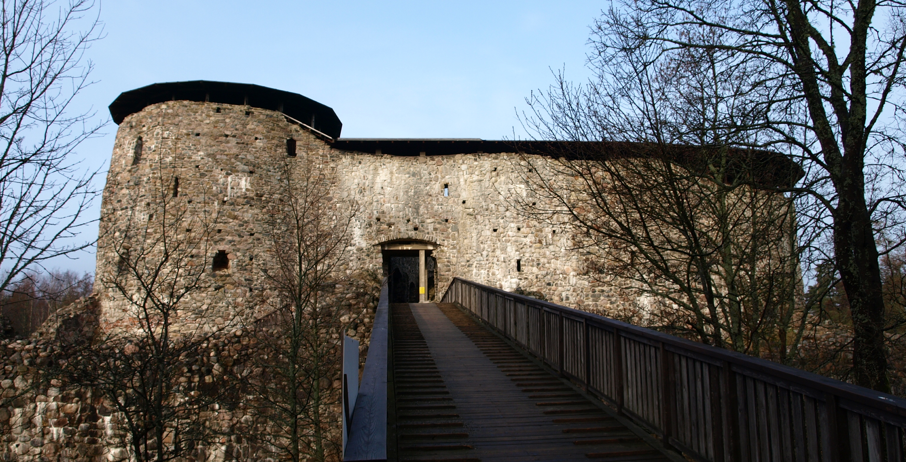 Die Burgruine Raseborg bei Snappertuna (Südfinnland)